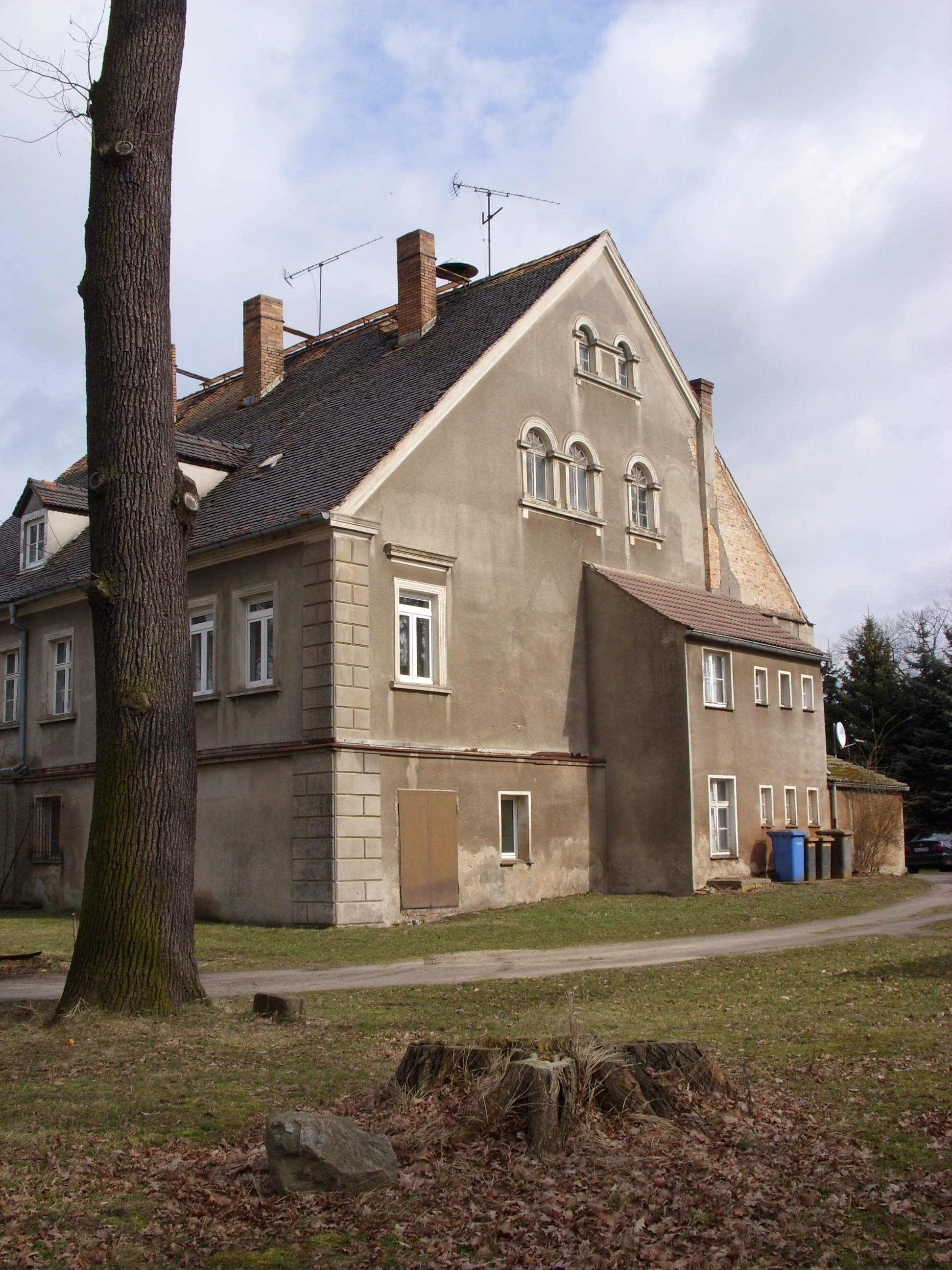 Das alte Gutshaus in Mönau, Gemeinde Boxberg, Landkreis Görlitz. Hornjoserbsce: Dom knježka w Manjowje, gmejna Hamor, wokrjes Zhorjelc.